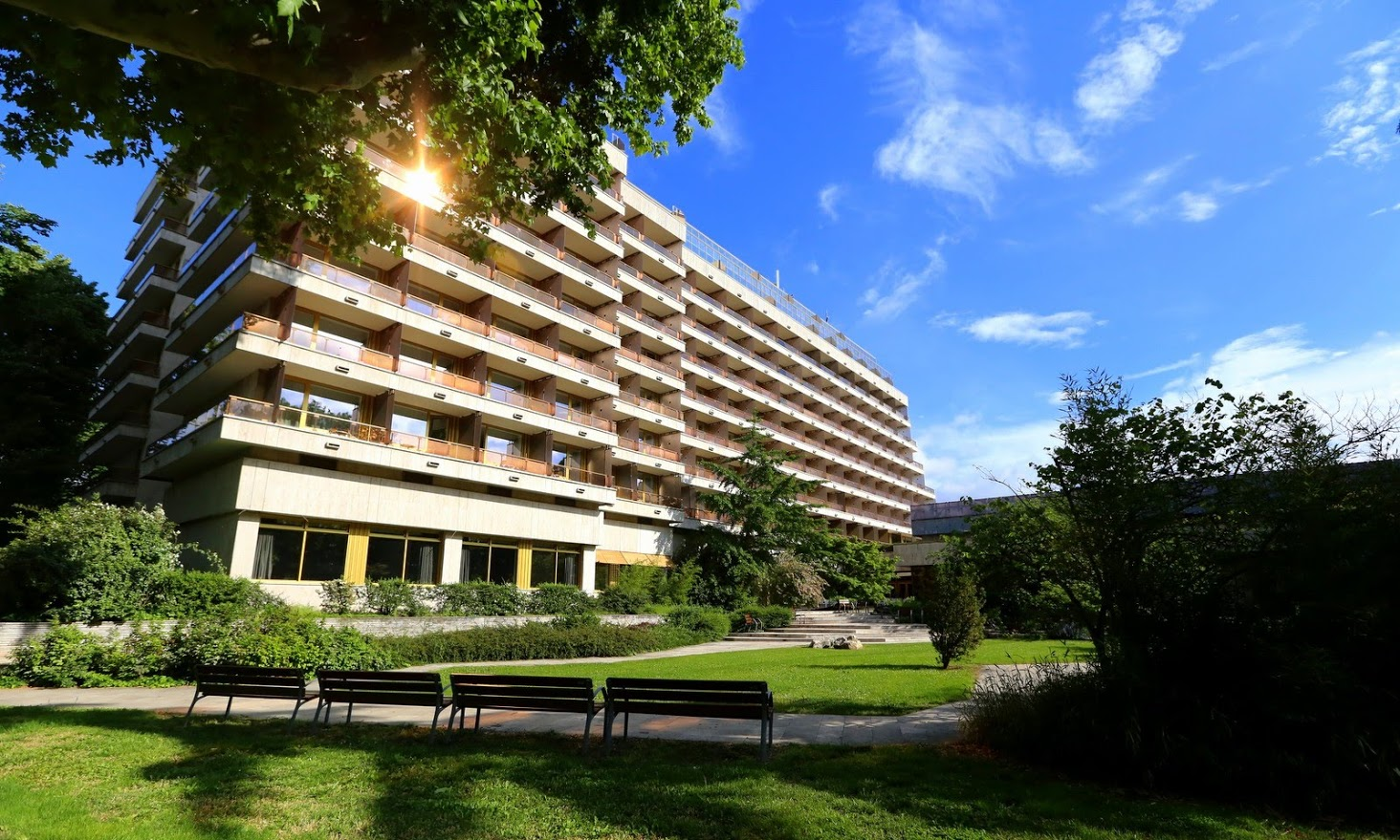 Danubius Hotel SPA RESORT Margitsziget